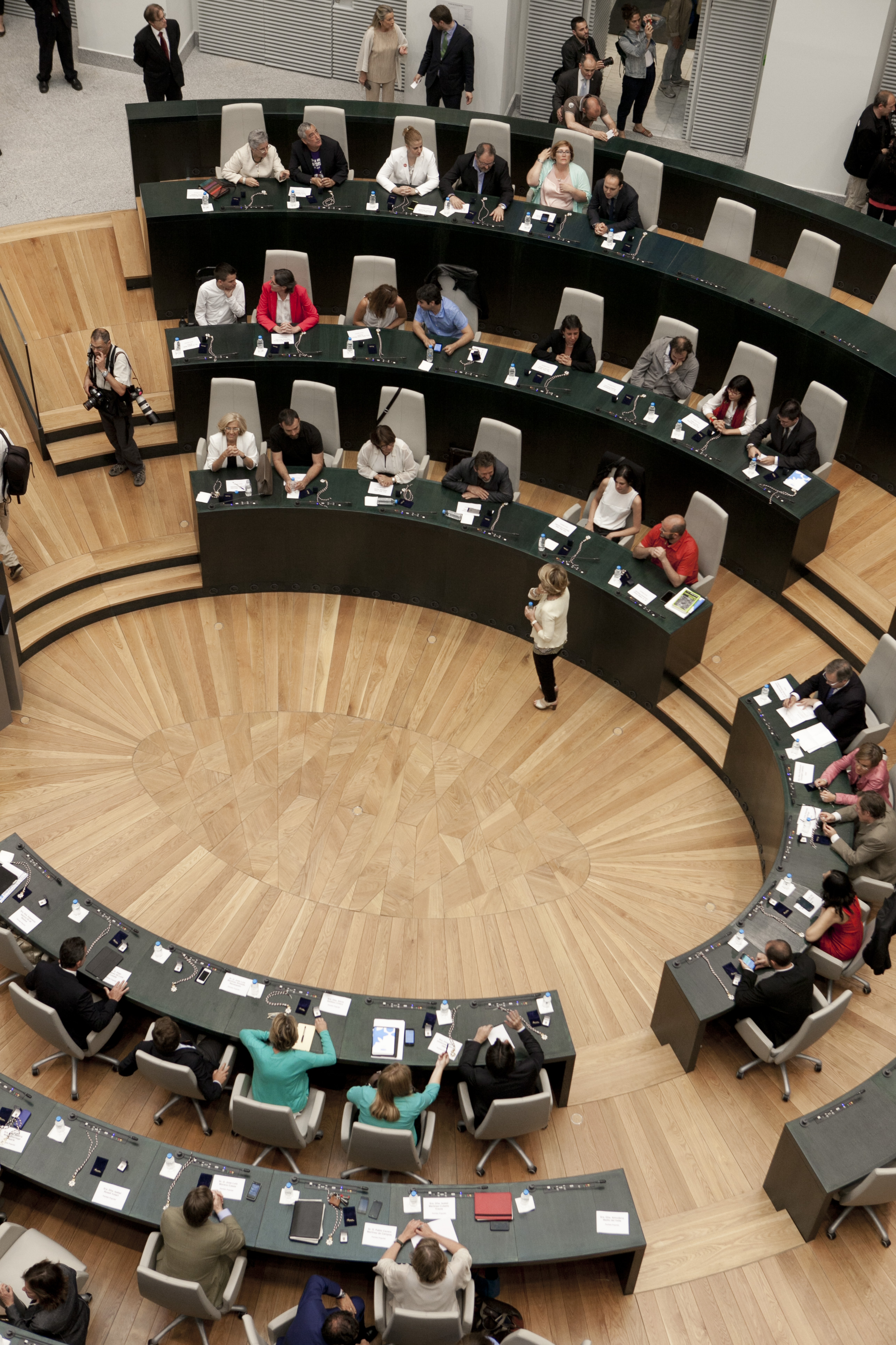 Investidura Manuela Carmena como alcaldesa Madrid